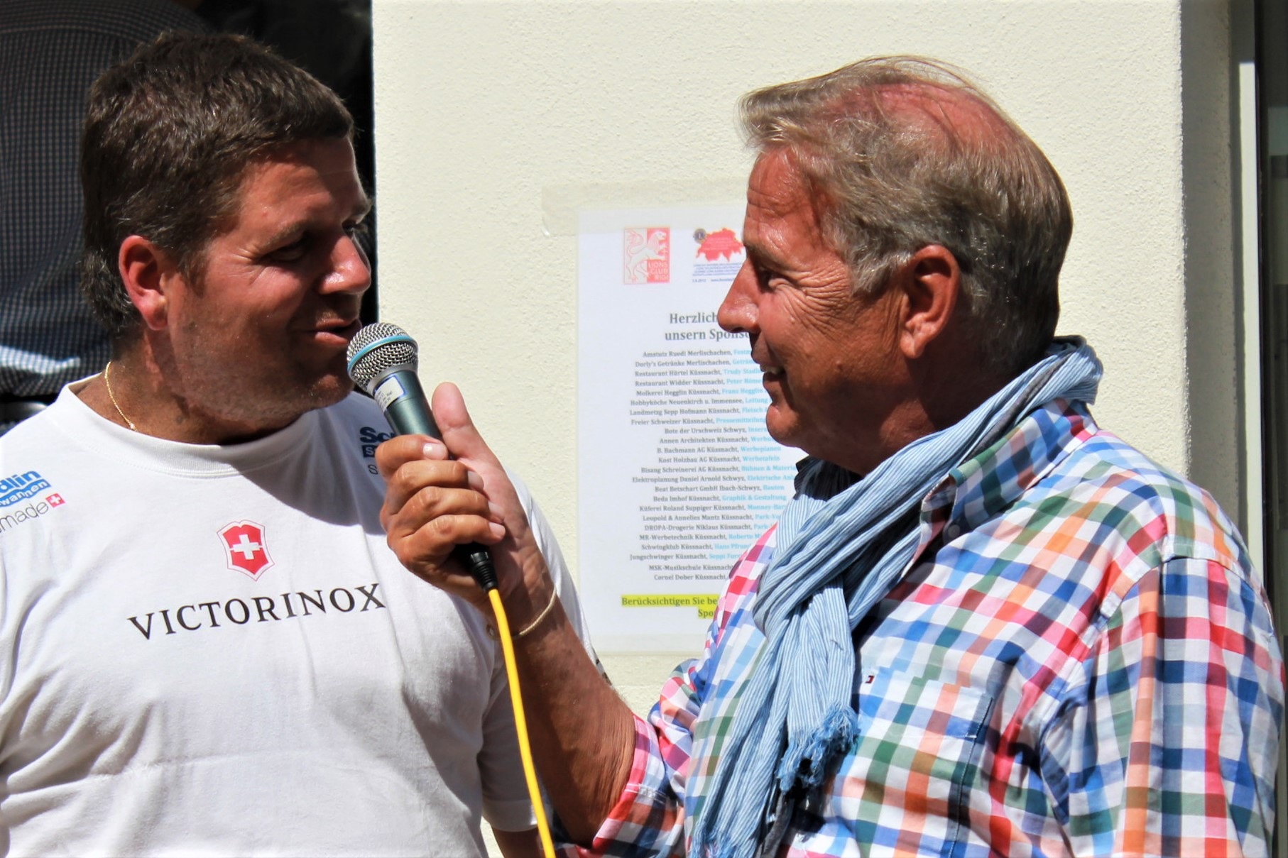 Der Schweizer Fernsehmoderator Kurt Zurfluh an einer Benefizveranstaltung im Interview mit Bobpilot Beat Hefti (2012).